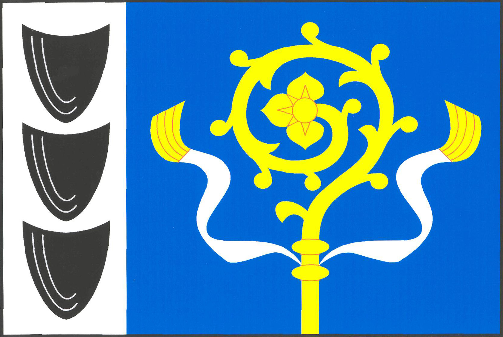 Vlajka obce Kamenice (okres Jihlava)